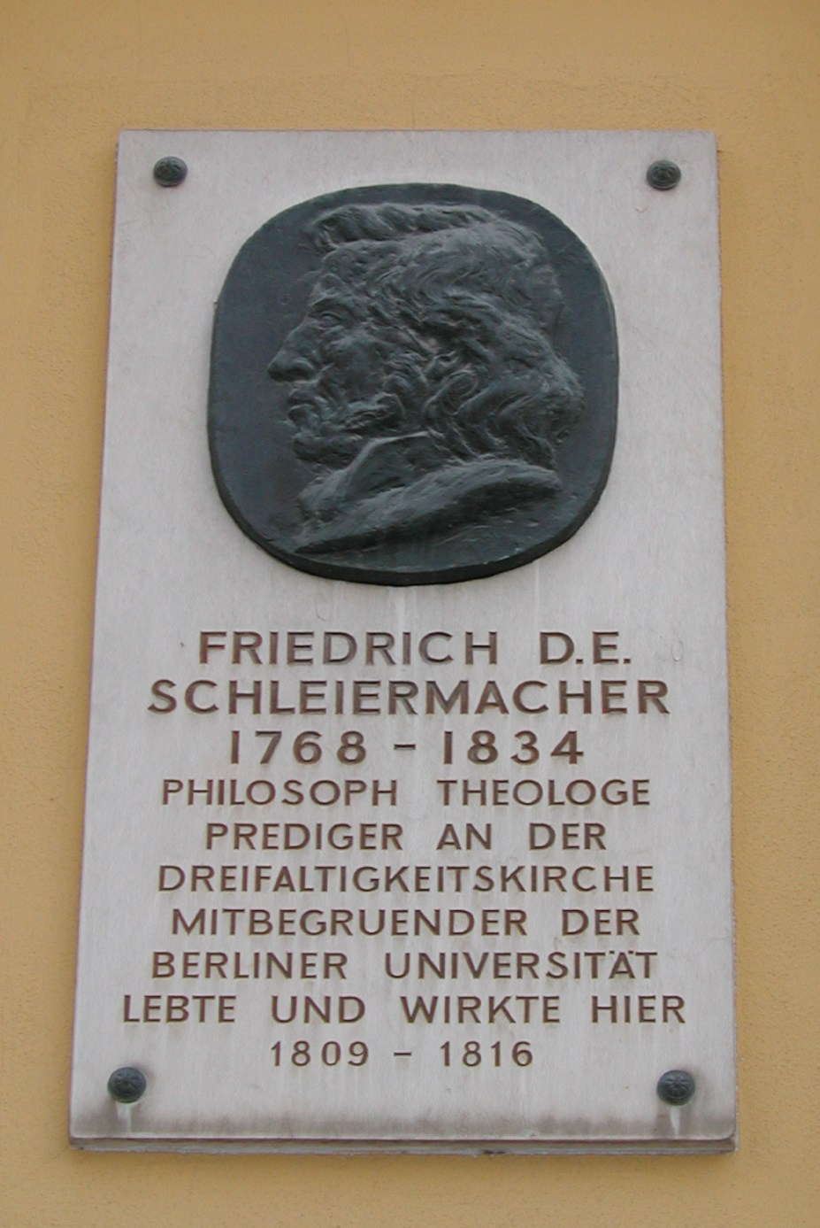 Die Gedenktafel für den Theologen Schleiermacher am Gemeindehaus der Evangelischen Gemeinde in der Friedrichstadt (Schleiermacher-Haus) in Berlin